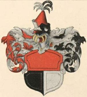 Gersdorffi suguvõsa aadlivapp